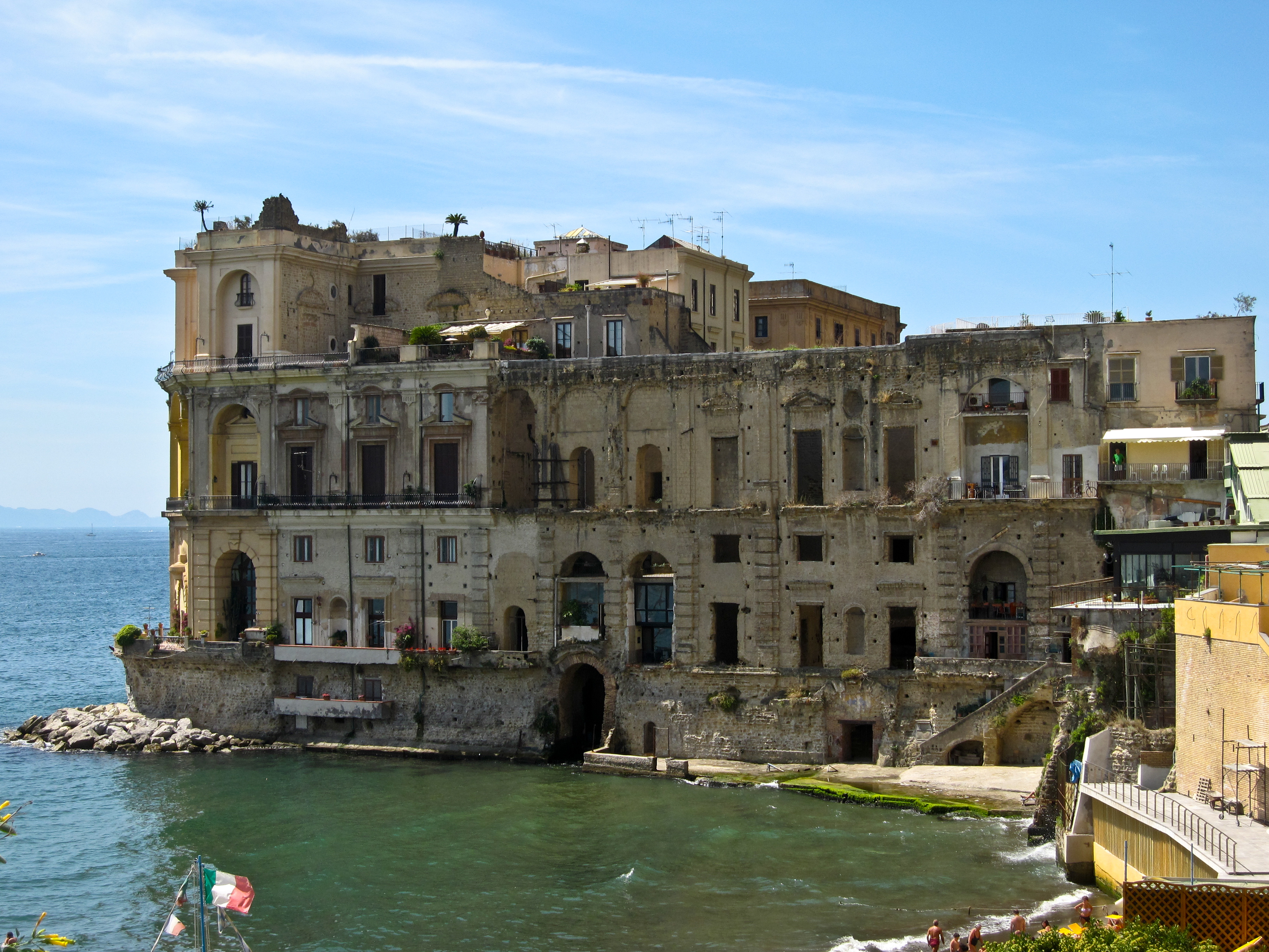 Passeggiando e osservando. Il Palazzo Donn'Anna.